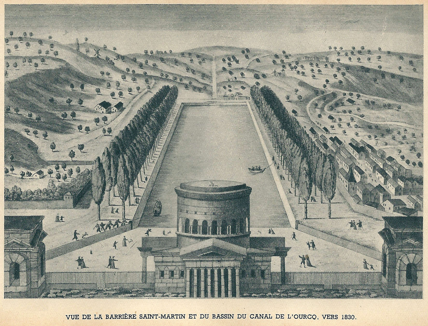 Barrière Saint-Martin et canal de l'Ourcq, à Paris (Seine, France) en 1800